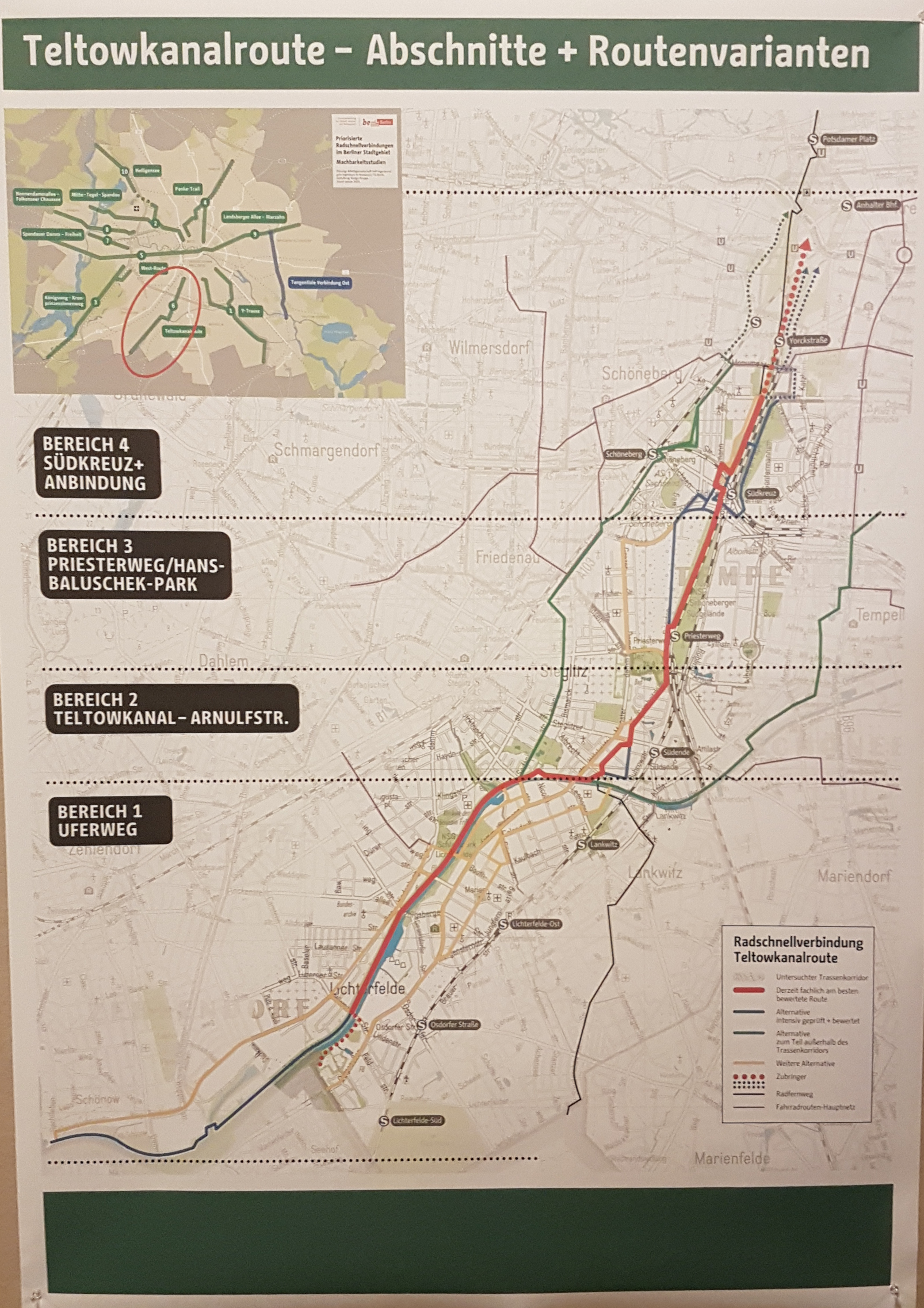 Informations- und Dialogveranstaltung zur Radschnellverbindung Teltowkanal im Rathaus Schöneberg mit Regine Günter, Senatorin für Umwelt, Verkehr und Klimaschutz Thomas Richter, Leiter des Fachgebiets Straßenplanung und Straßenbetrieb an der Technischen Universität Berlin Christiane Heiß, Bezirksstadträtin